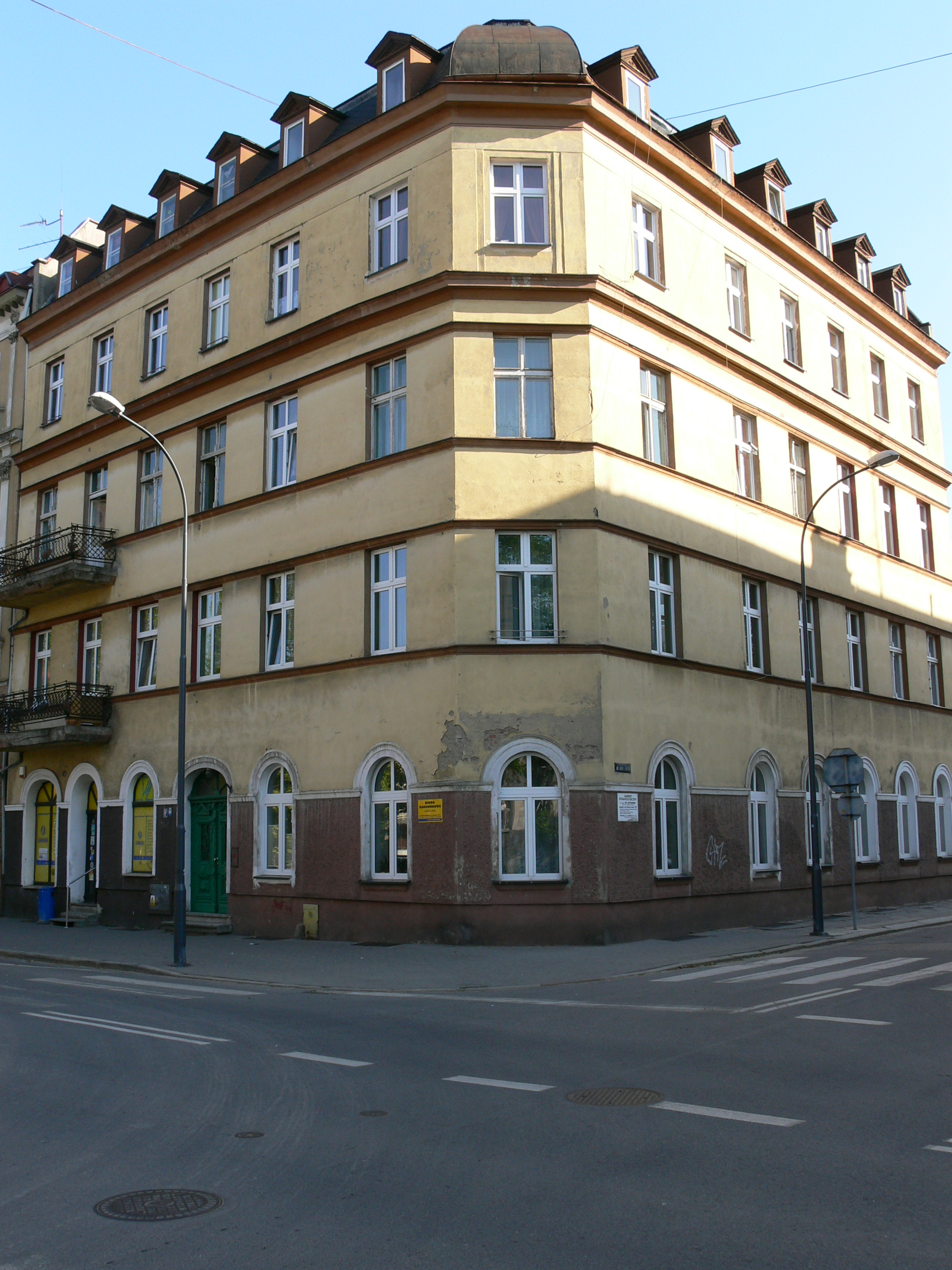 Racibórz - kamienica przy ul. Staszica 17